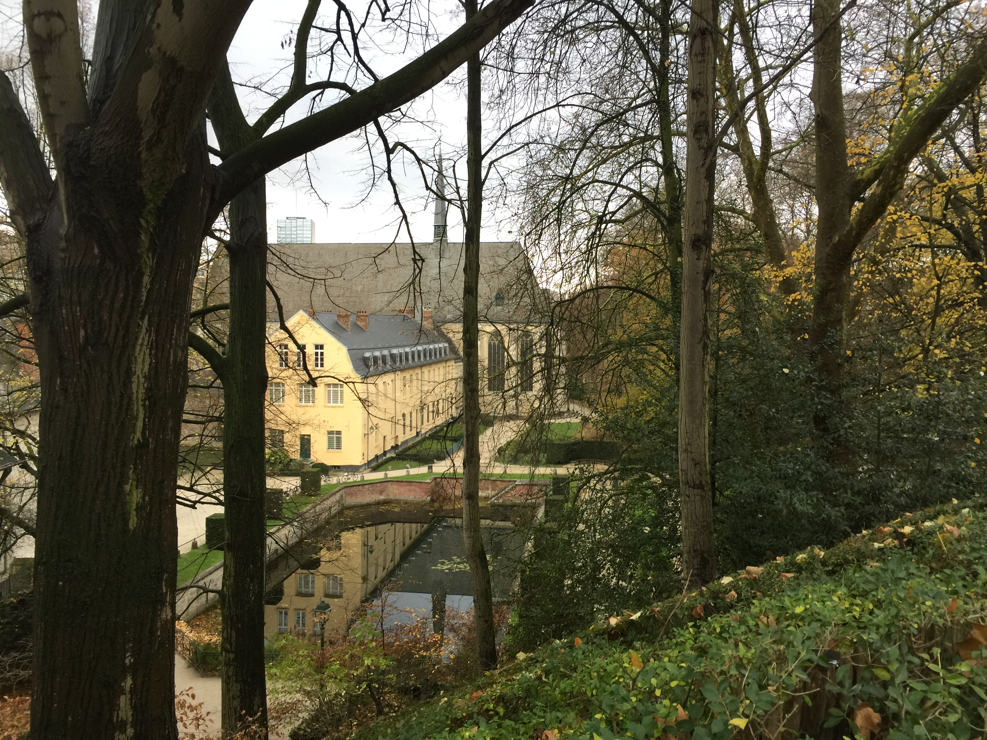 The fishpond of la Cambre Abbey